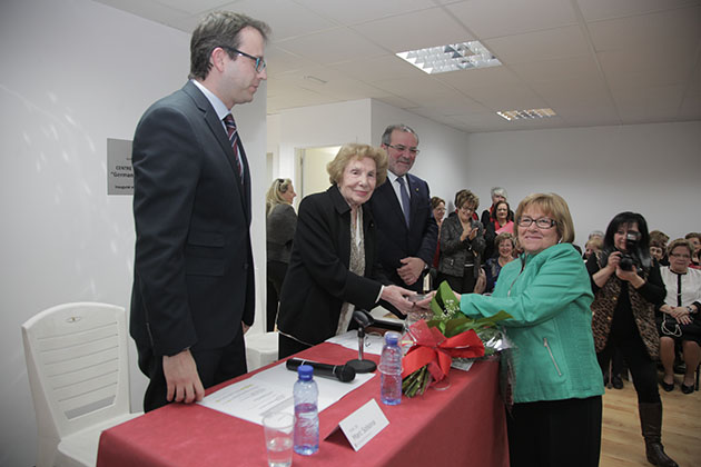 HOmenatge a Anna Maria Freixes